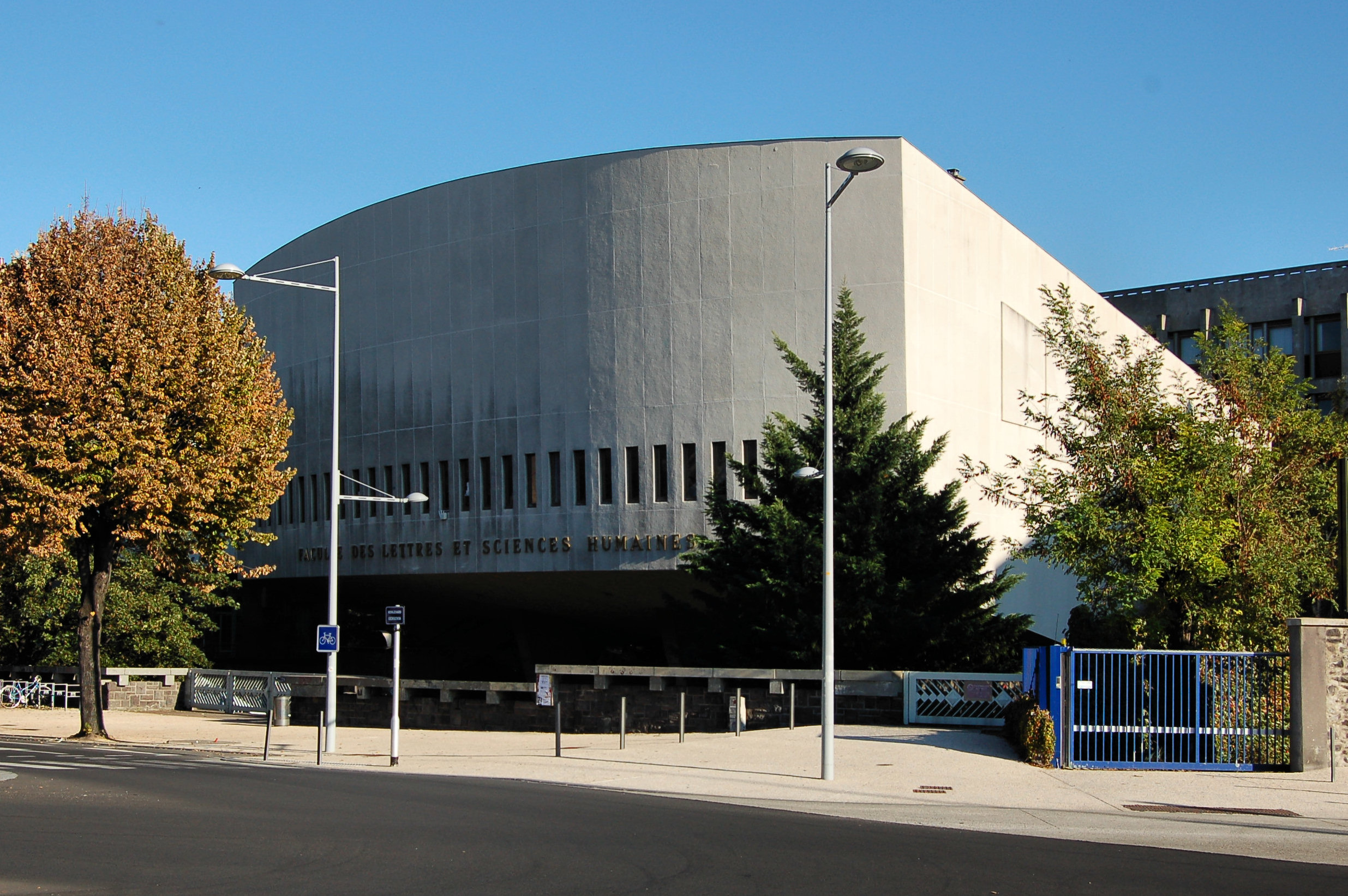 L'Université Blaise Pascal, site Gergovia (Clermont-Ferrand, France)